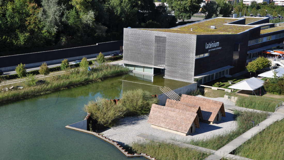 Photo aérienne du musée du Laténium, d'une partie du parc archéologique et de la reconstitution du niveau du lac au temps des lacustres ; tirée des archives du Laténium